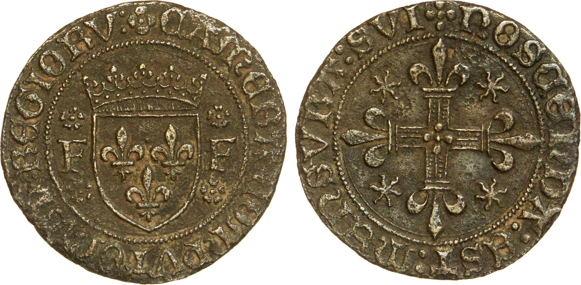 Métal : cuivre rouge Titulature avers : CAMERA.COMPUTORUM.REGIORUM. Description avers : Écu de France couronné, accosté de deux F entourés en haut et en bas de rosettes. Traduction avers : Chambre des comptes du Roi. Titulature revers : NOSCENDA. EST. MENSURA. SUI. Description revers : Croix fleurdelisée cantonnée de soleils. Traduction revers : Il faut apprendre sa mesure ( Juvénal, Satires 11, 35).